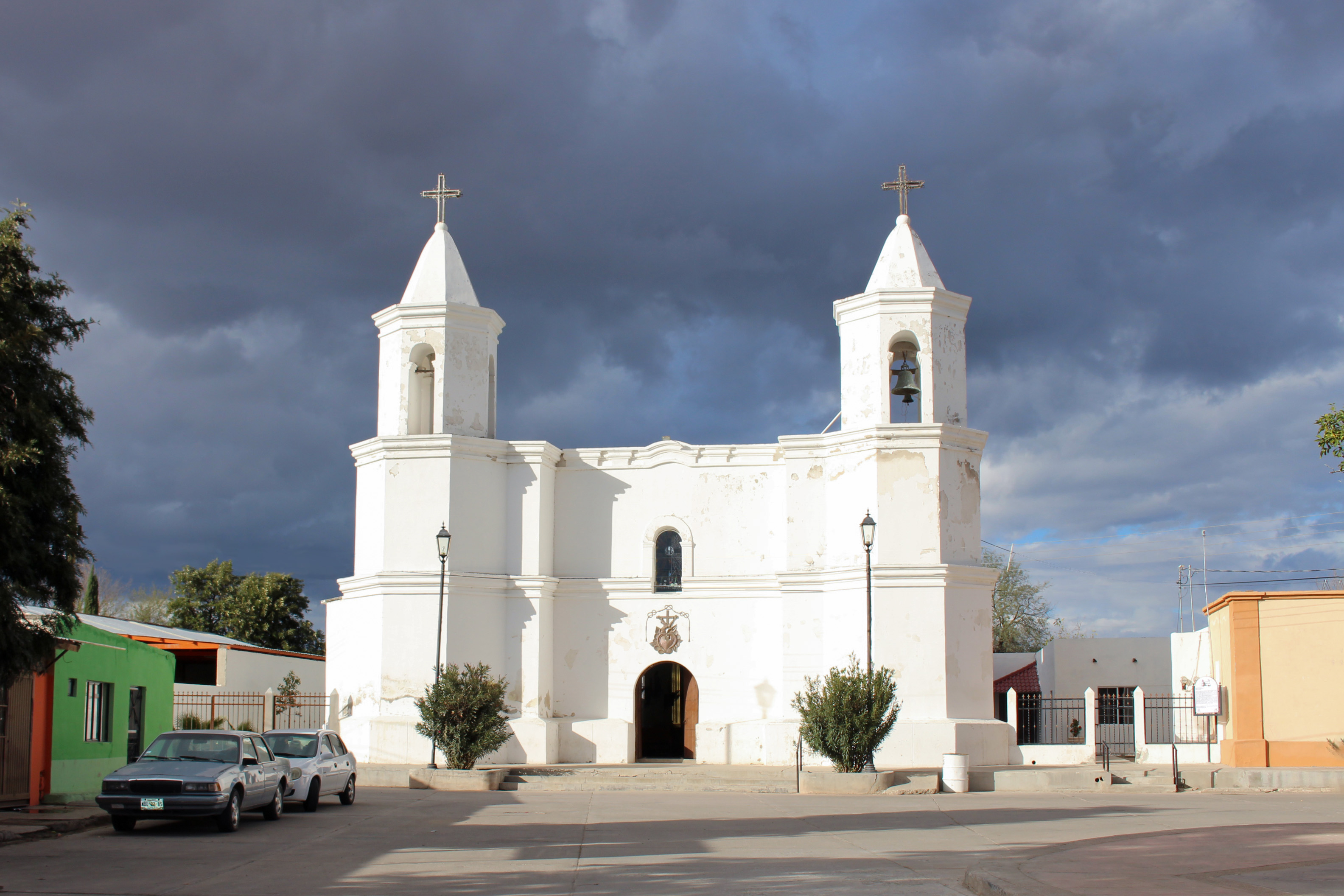 Templo de San Pedro en Aconchi Sonora Mèxico